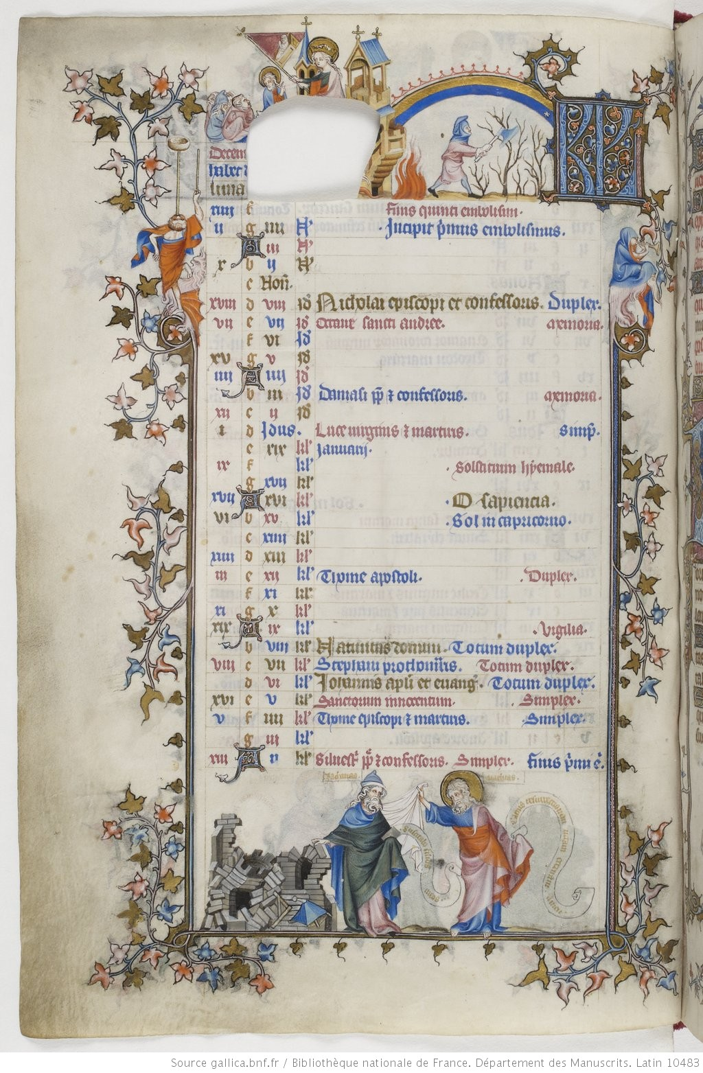 Bréviaire de Belleville Jean Pucelle t.1 6v